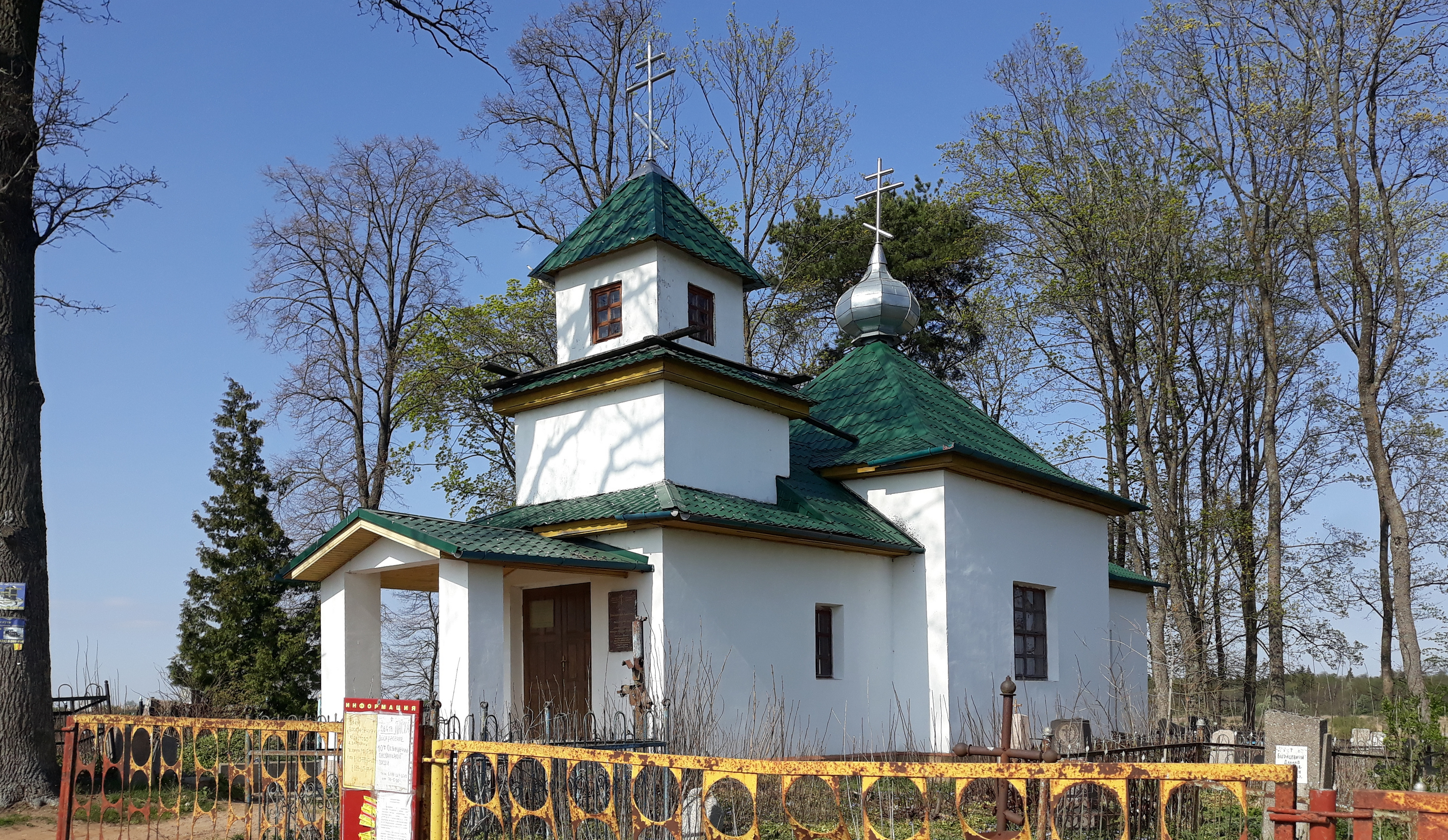 Свята-Васкрасенская царква